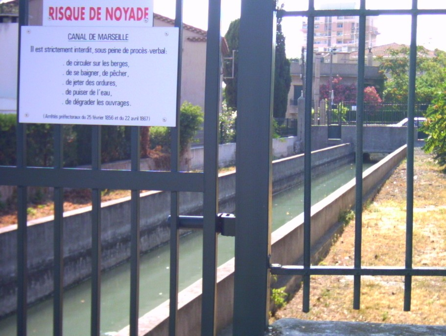 Barrière interdisant l'accès au canal (à Marseille)